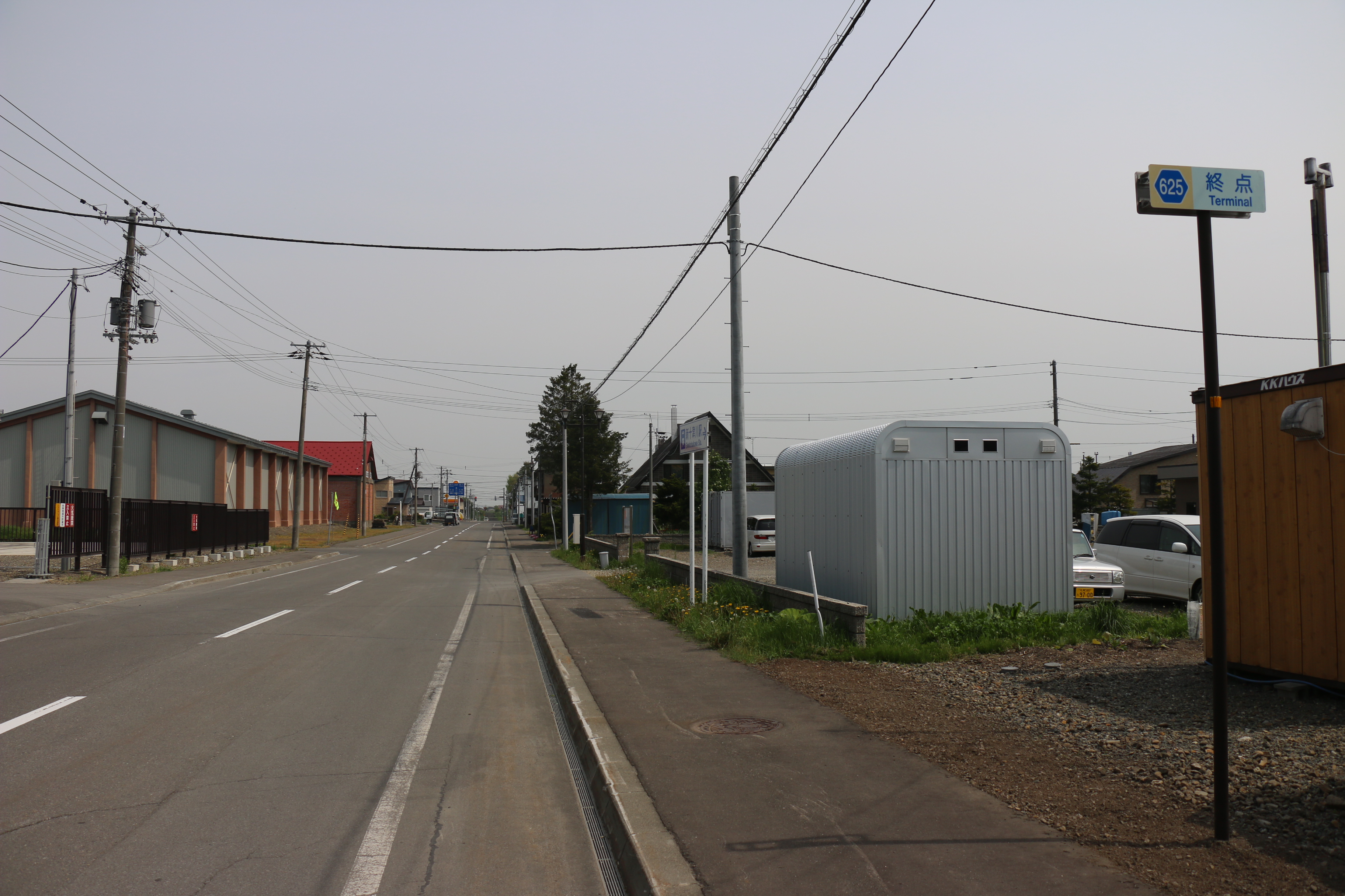 北海道道625号線 終点付近